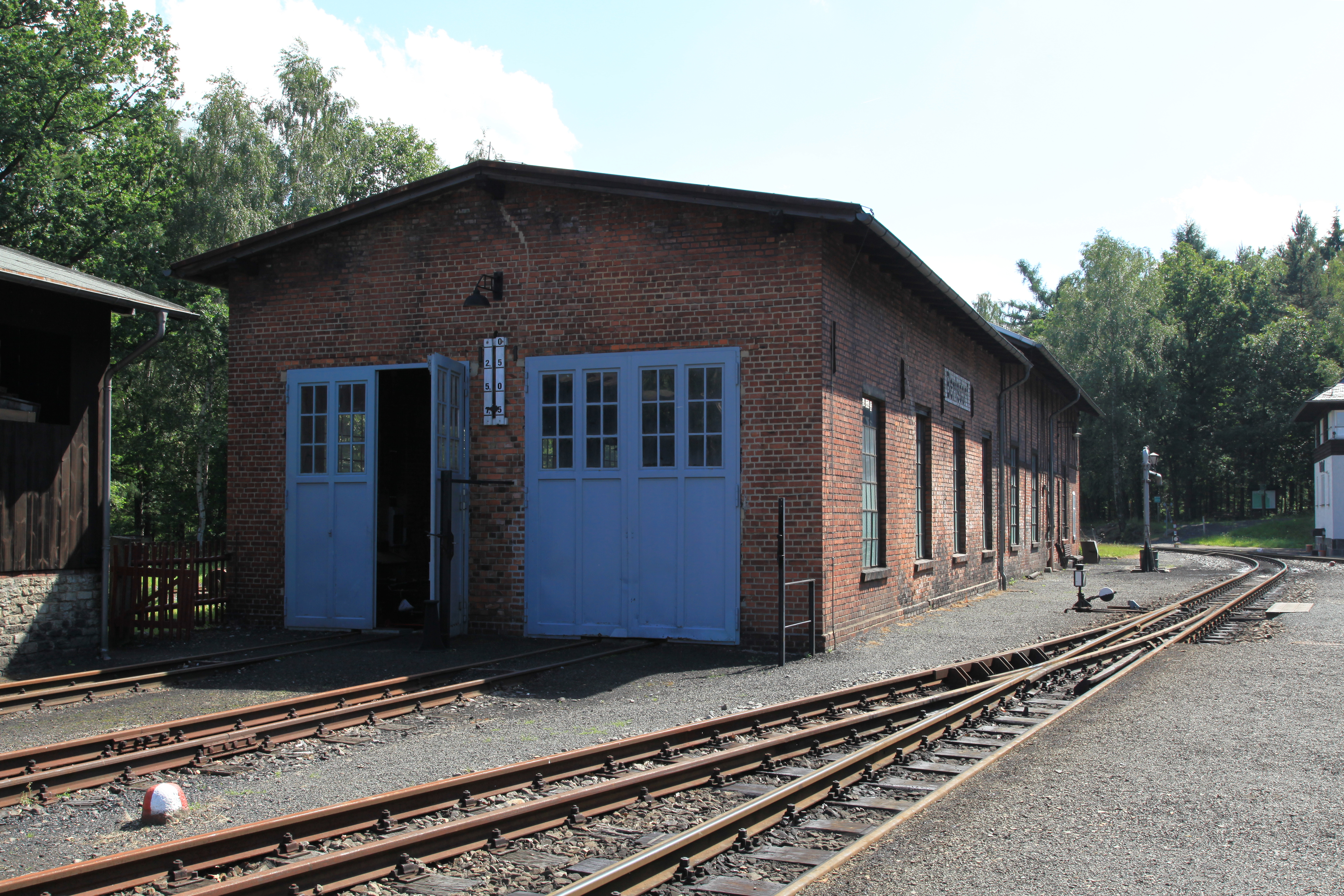 Bahnhof Bertsdorf in Olbersdorf